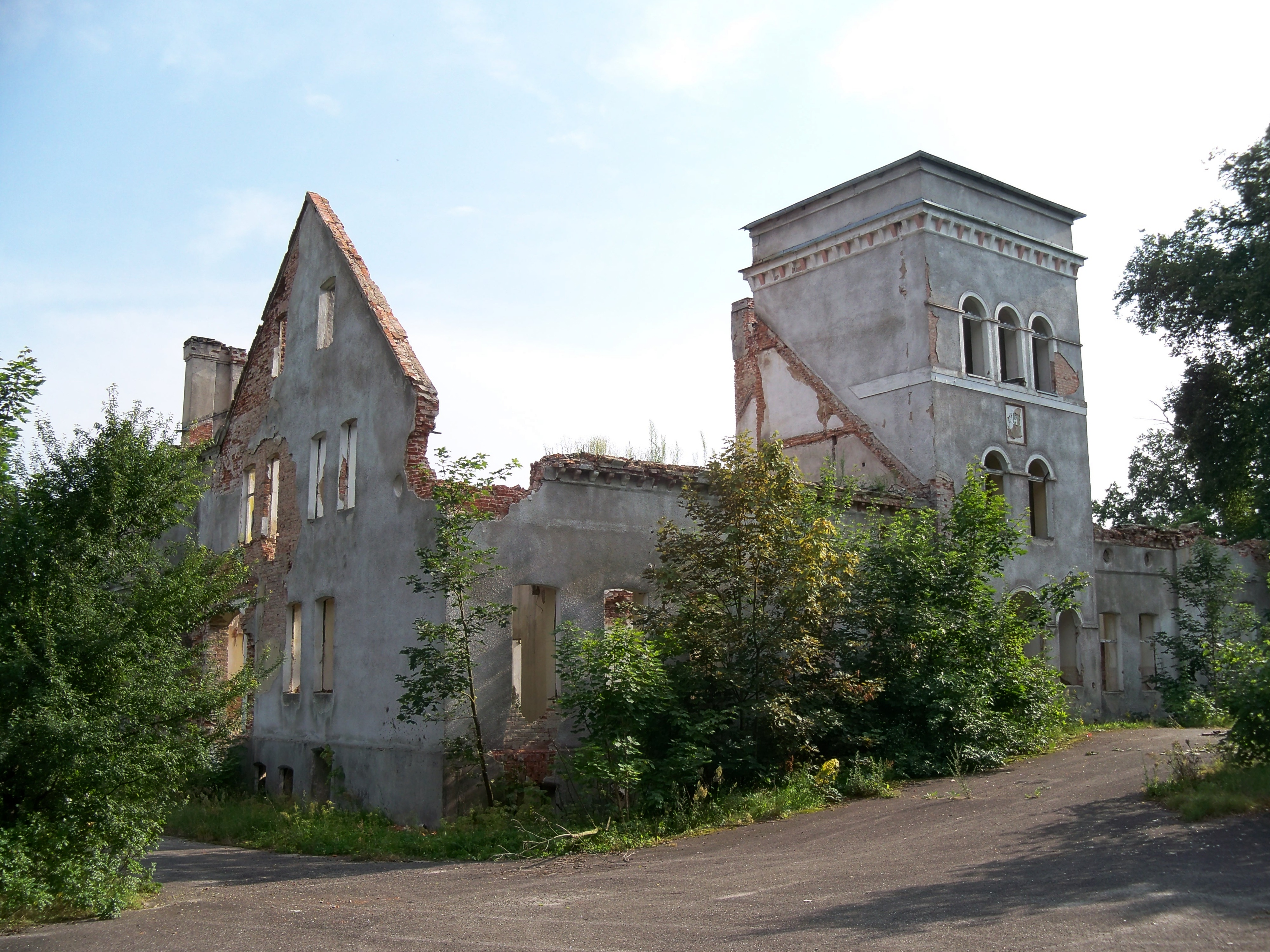 Ruiny pałacu w Smęcinie